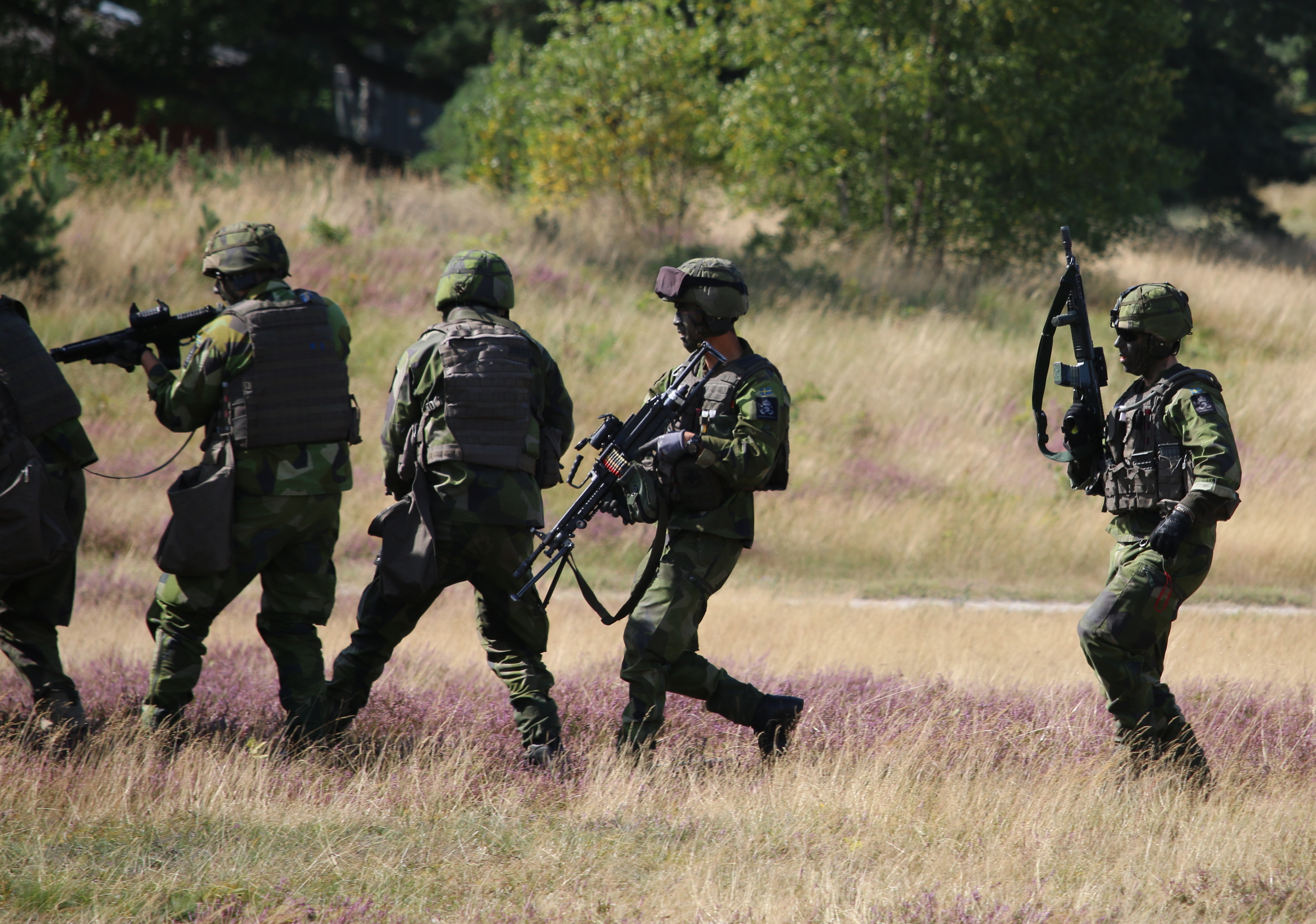 Skyttesoldater Revinge 2015